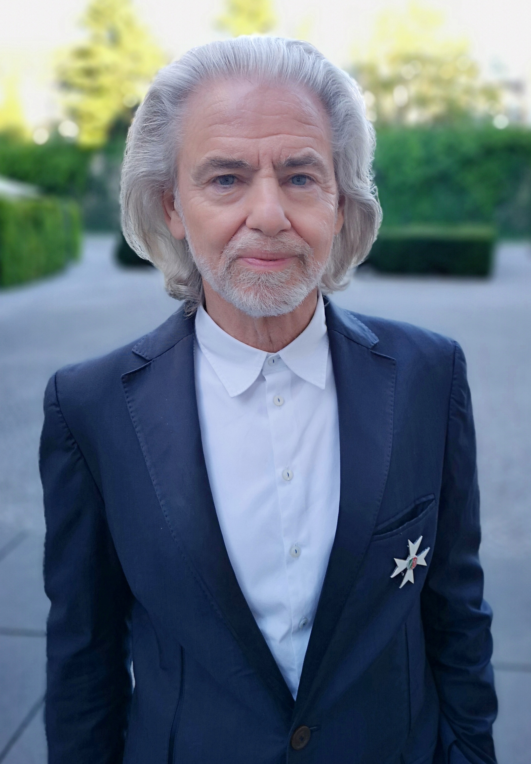 Hermann Bühlbecker (2018), Verleihung des Verdienstordens des Landes Nordrhein-Westfalen 2018